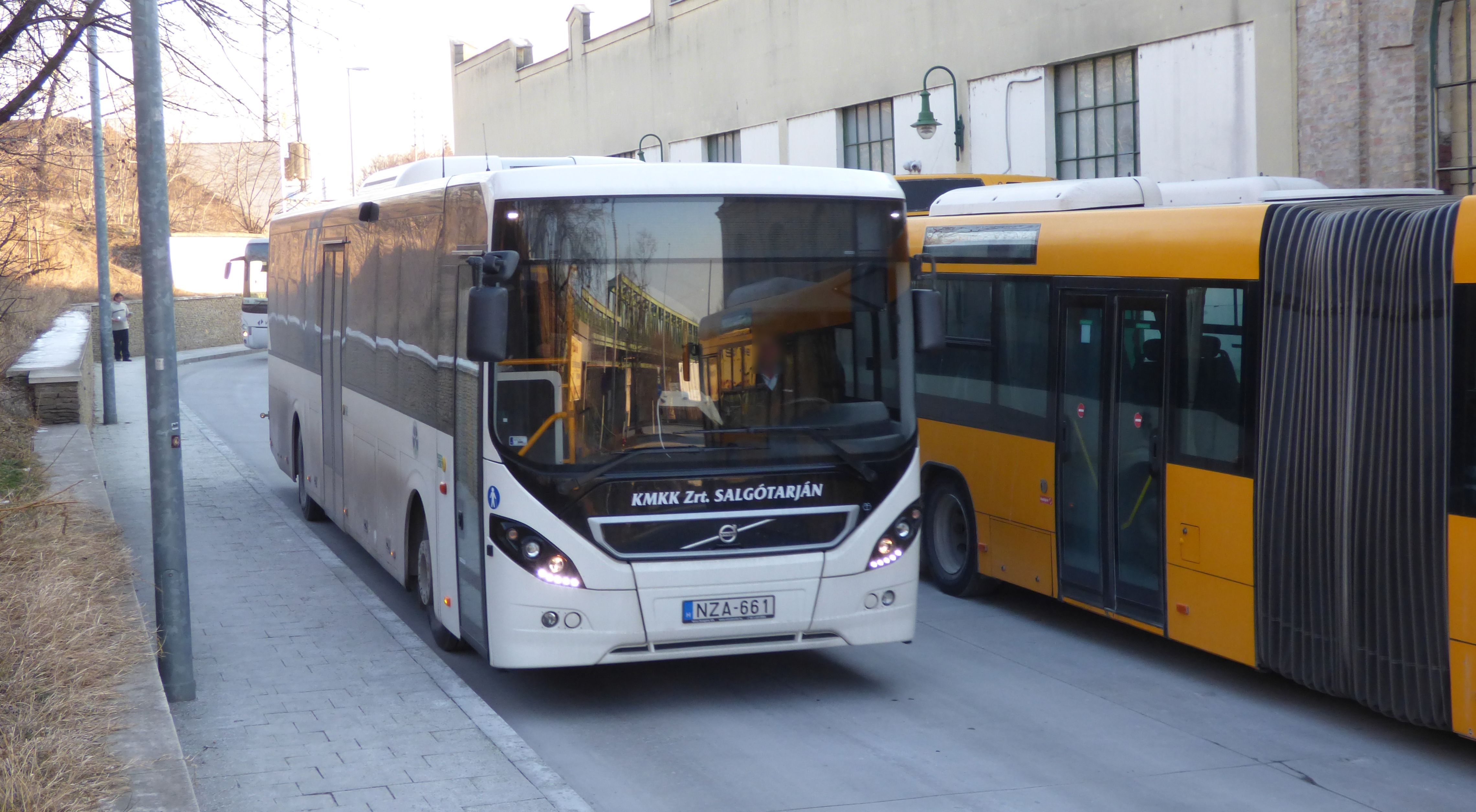 1010-es jelzésű Volvo 8900-as busz Újpest-Városkapunál (frsz. NZA-661)